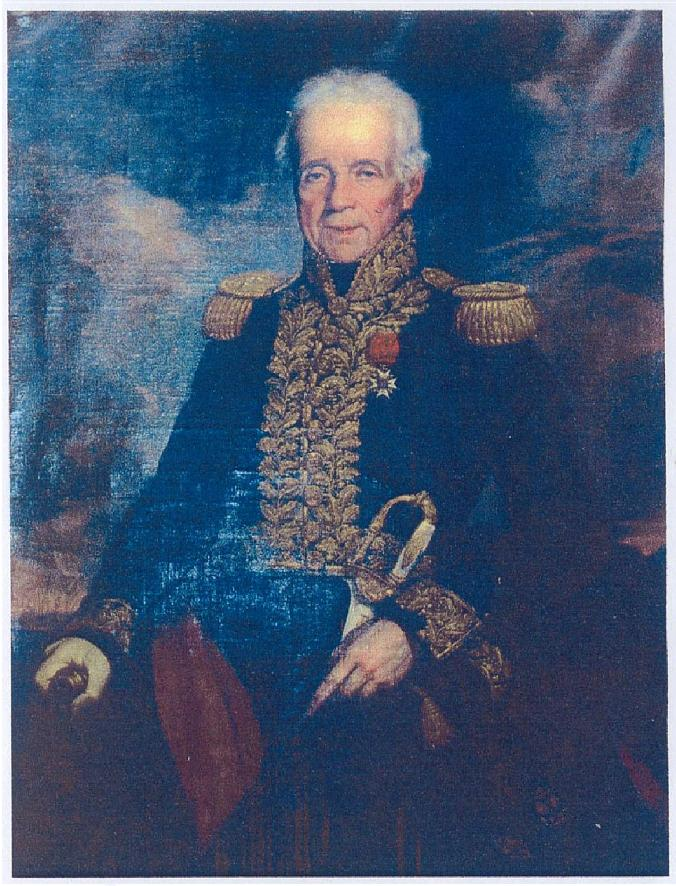 Portrait du contre-amiral Jean-François d'Assas-Montdardier (1760-1850), par Monceret (1841) - Musée Cévenol - Le Vigan (Gard)